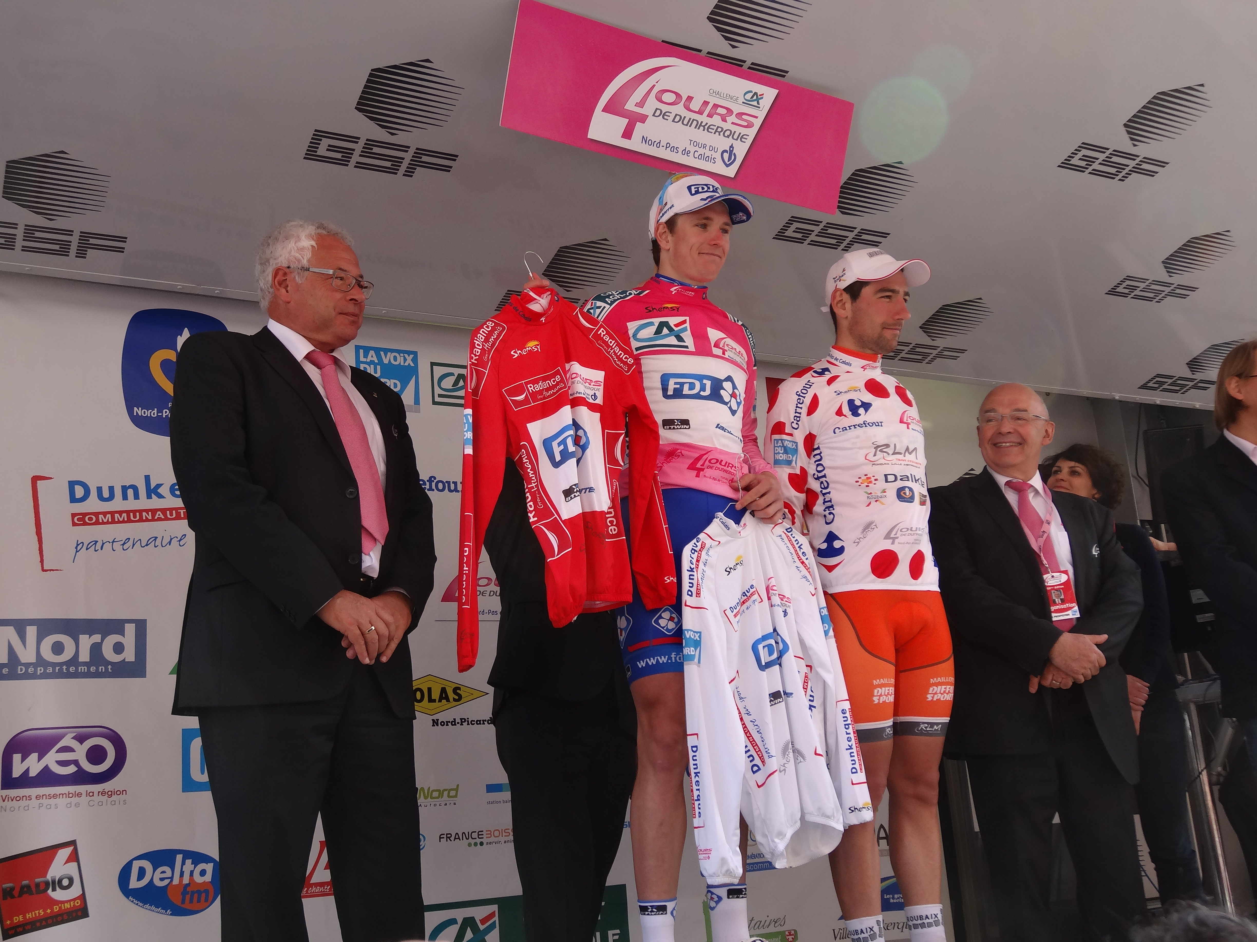 Reportage photographique réalisé le dimanche 5 mai 2013 à l'arrivée de la cinquième et dernière étape de l'édition 2013 des Quatre jours de Dunkerque à Dunkerque, Nord, Nord-Pas-de-Calais, France. Depicted people: Bernard Martel, Arnaud Démare and Julien Duval